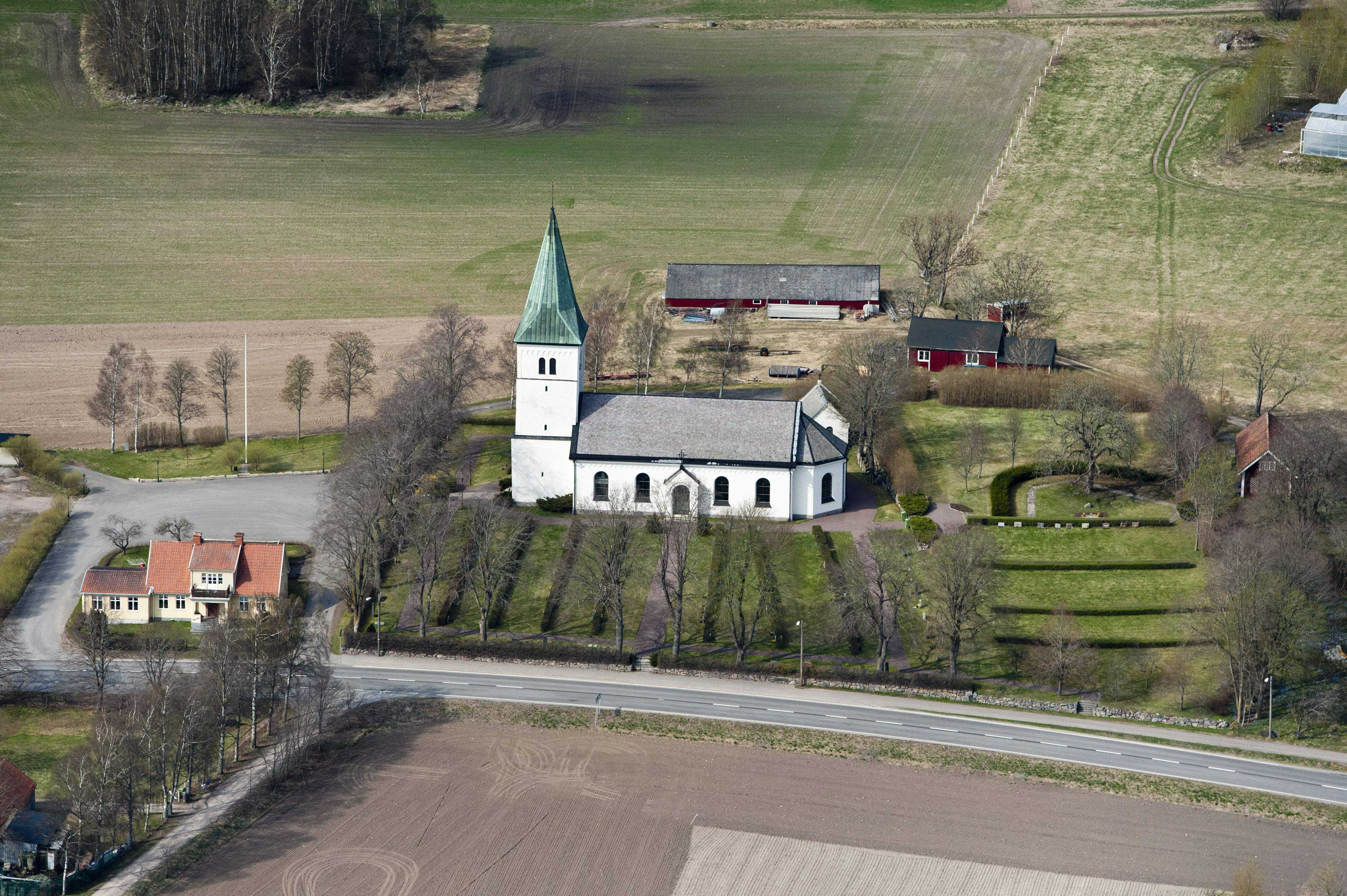 Fivelstads ka